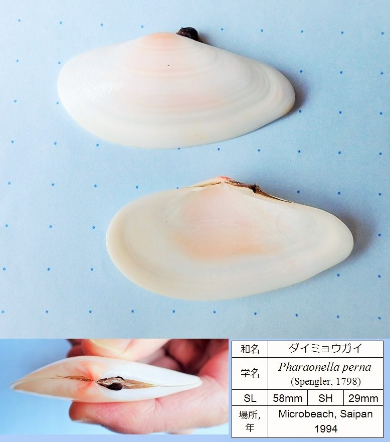 サンパン、マイクロビーチでひろったダイミィウガイ。殻長58mm。